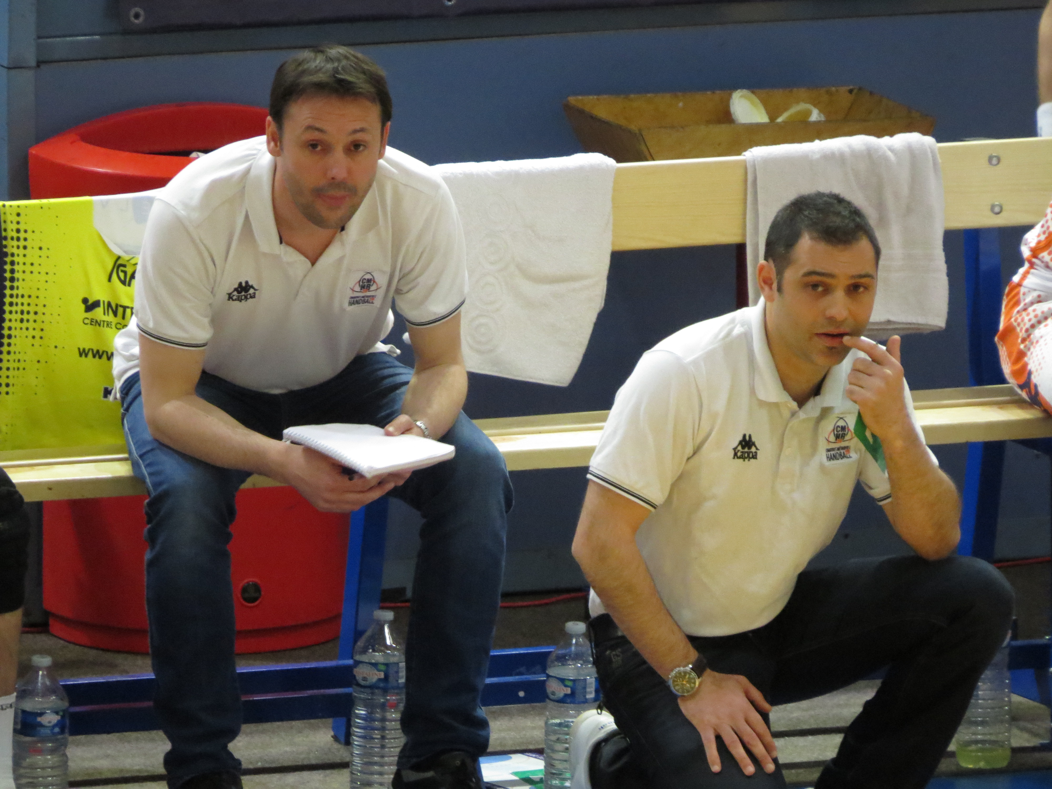 Match du championnat de France de Hand entre Créteil et Chartres Victoire de Créteil 39 - 35 entraineur : Jérémy Roussel Jérôme DELARUE (entraîneur adjoint)